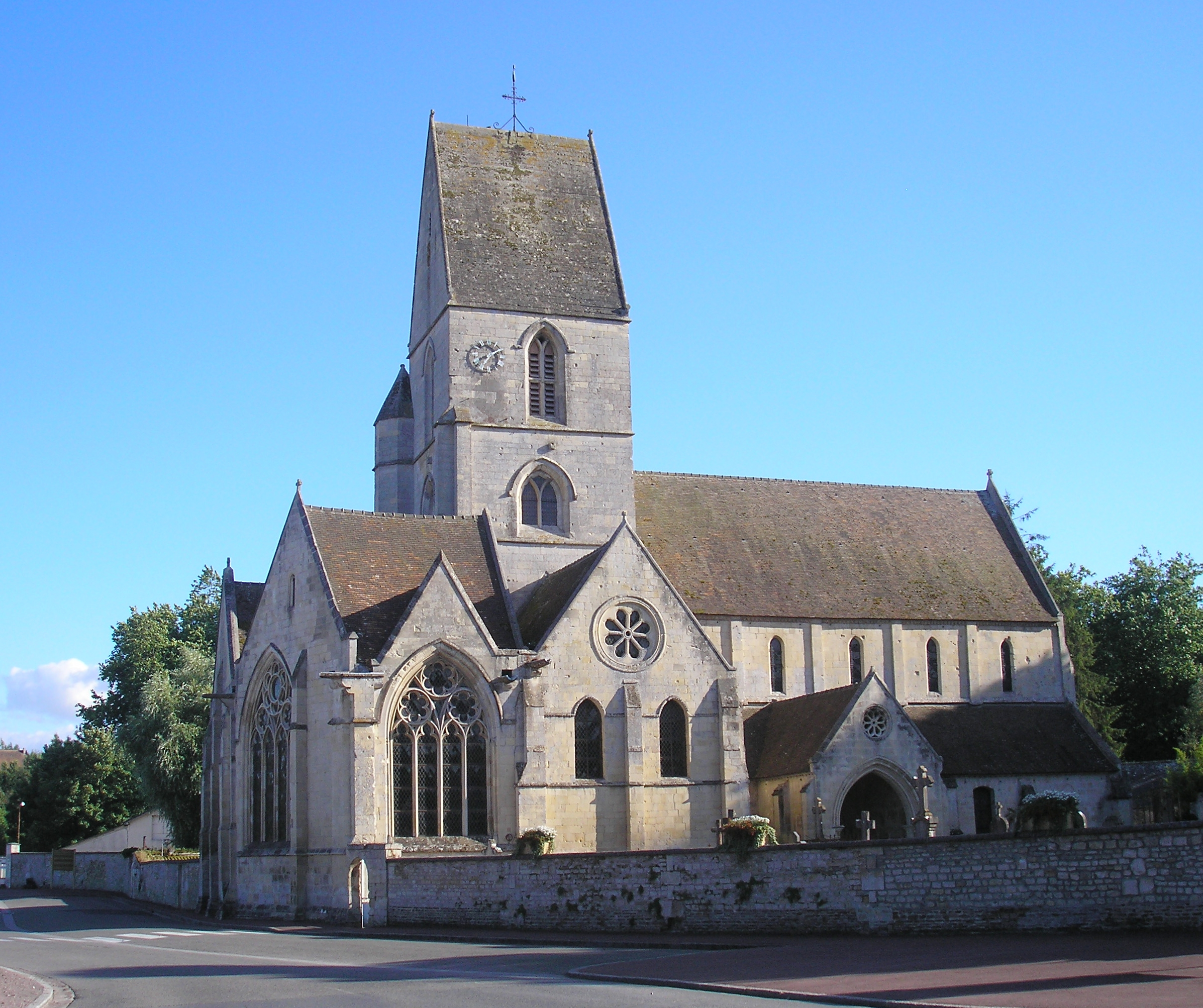 Verson (Normandie, France). L'église Saint-Germain.